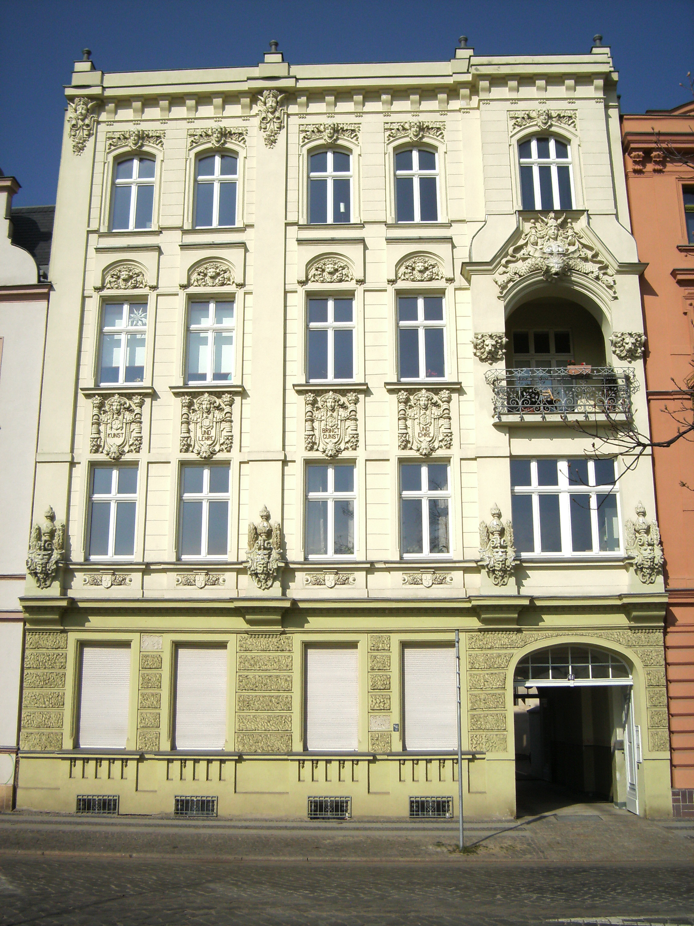 Schillerstraße 61